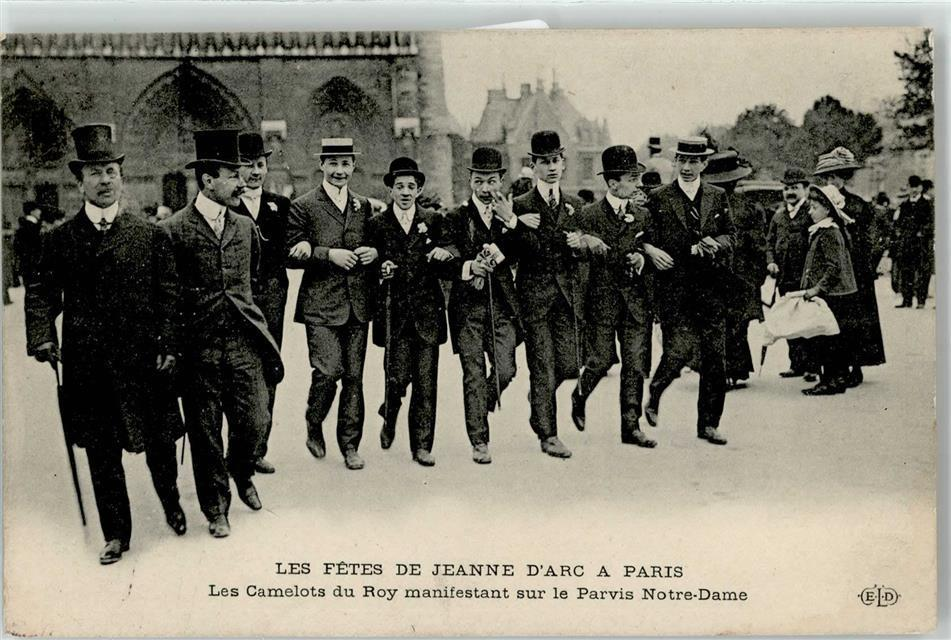 Fêtes de Jeanne d'Arc à Paris. Des camelots du roi manifestent devant le parvis de Notre-Dame de Paris. Carte postale.